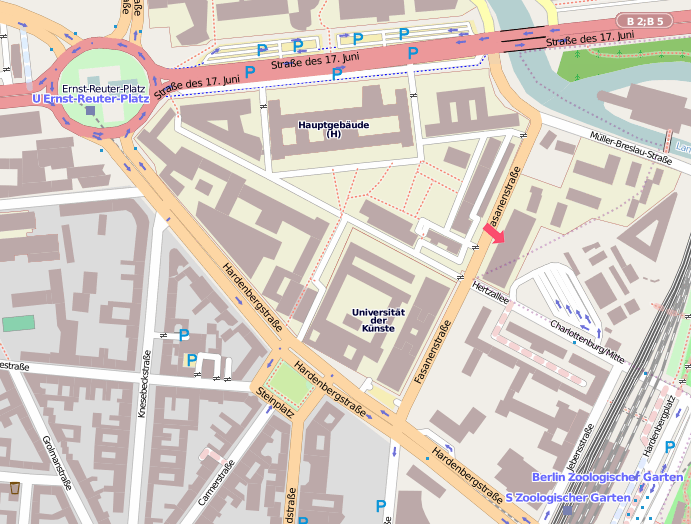 Verlauf der Hertzallee in Berlin-Charlottenburg, rechts entwidmeter Teil auf dem Campus der TU Berlin